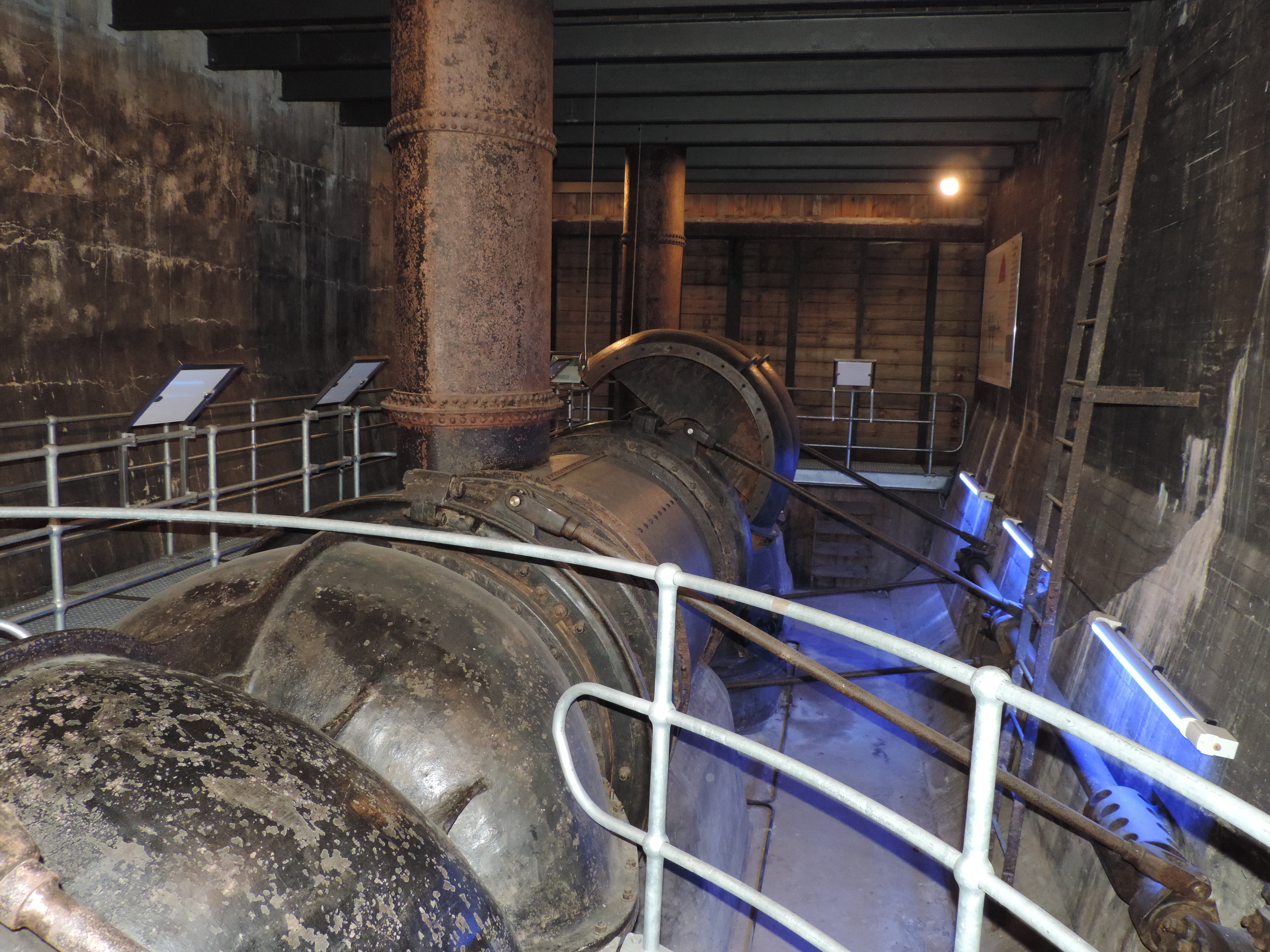 Francisturbine im Einlaufbauwerk, ursrünglich unter Wasser